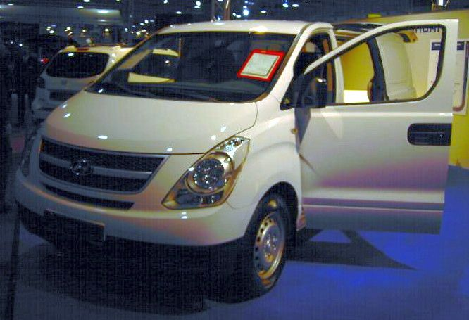 Hyundai H-1 in der neuesten Ausführung auf der Motorwelt Berlin 2008